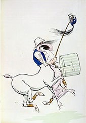 مقر الخياطة